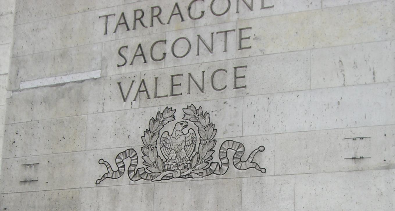 Fotografía del Arco de Triunfo de Paris con el nombre de 3 batallas.